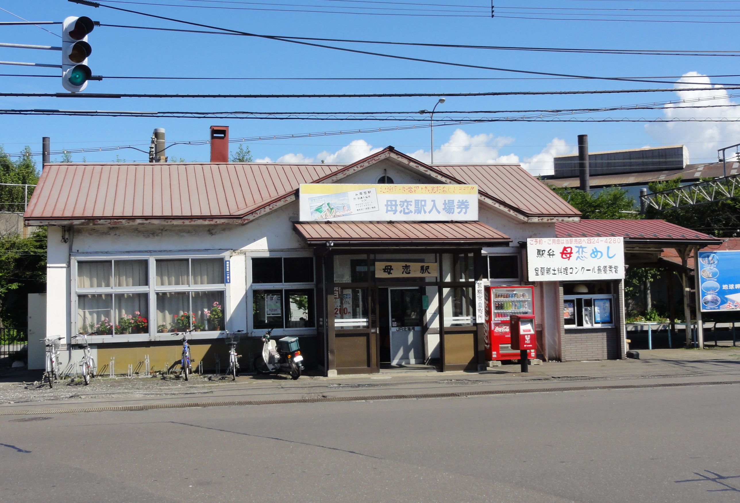 JR北海道母恋駅